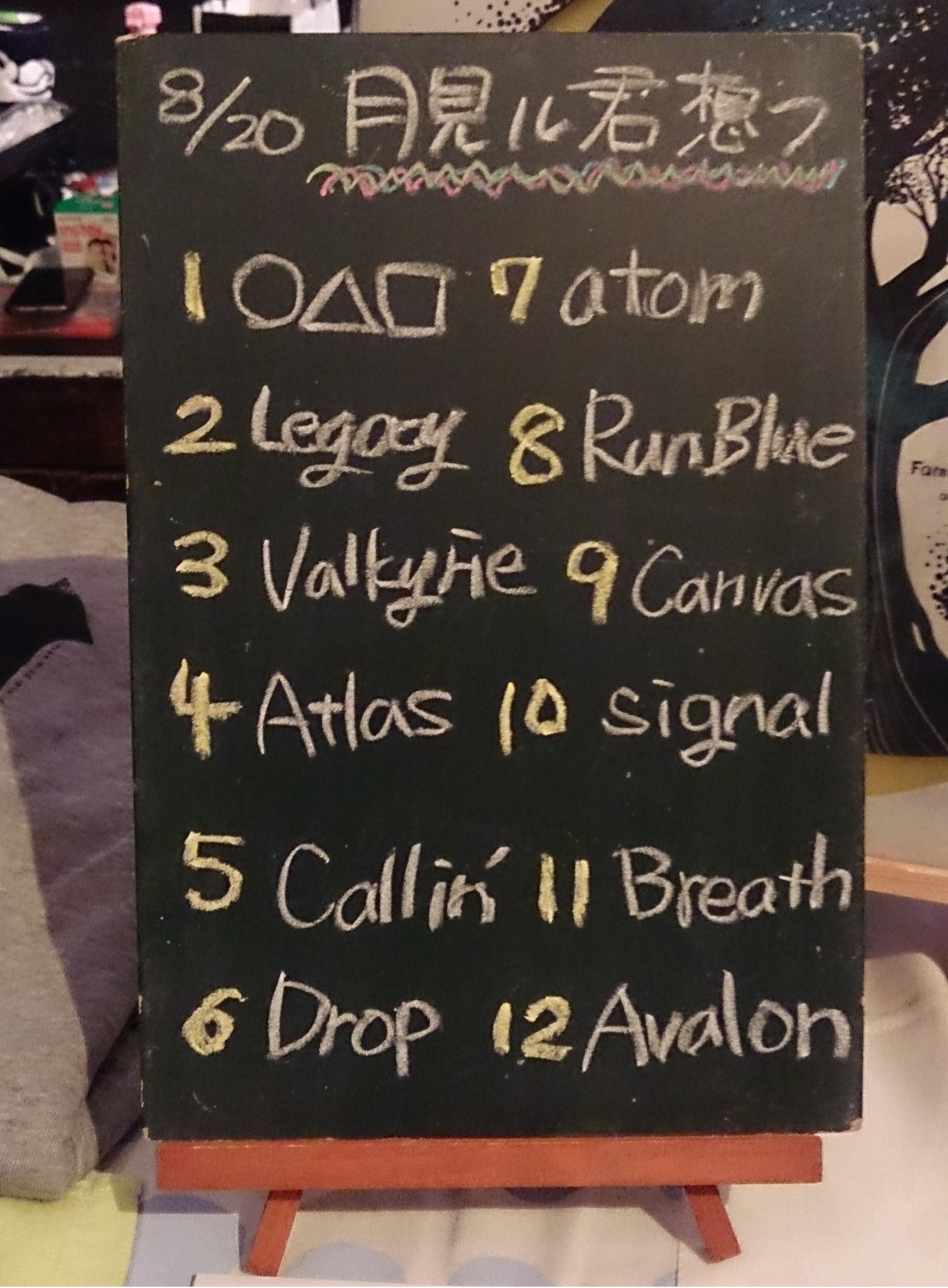 amiinAセトリボード(20170820(1))